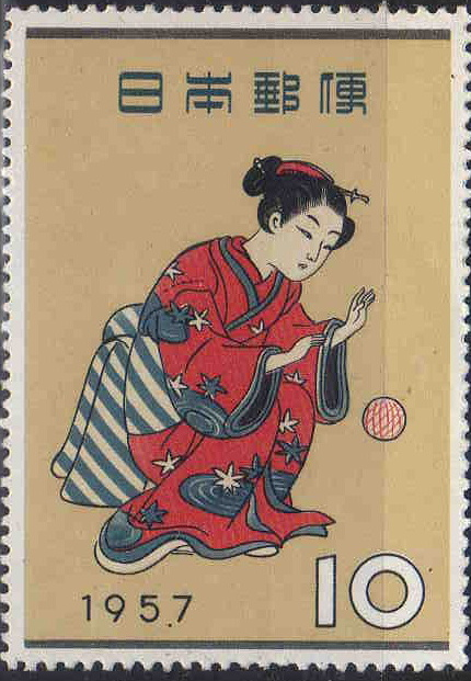 日本の切手趣味週間。取り上げられた絵画は鈴木春信の「まりつき」